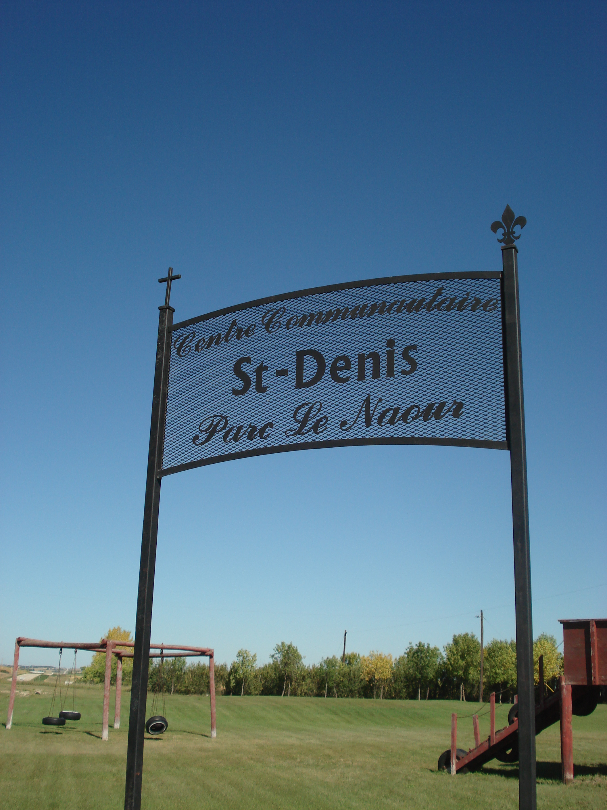 Le parc à St-Denis, Saskachewan